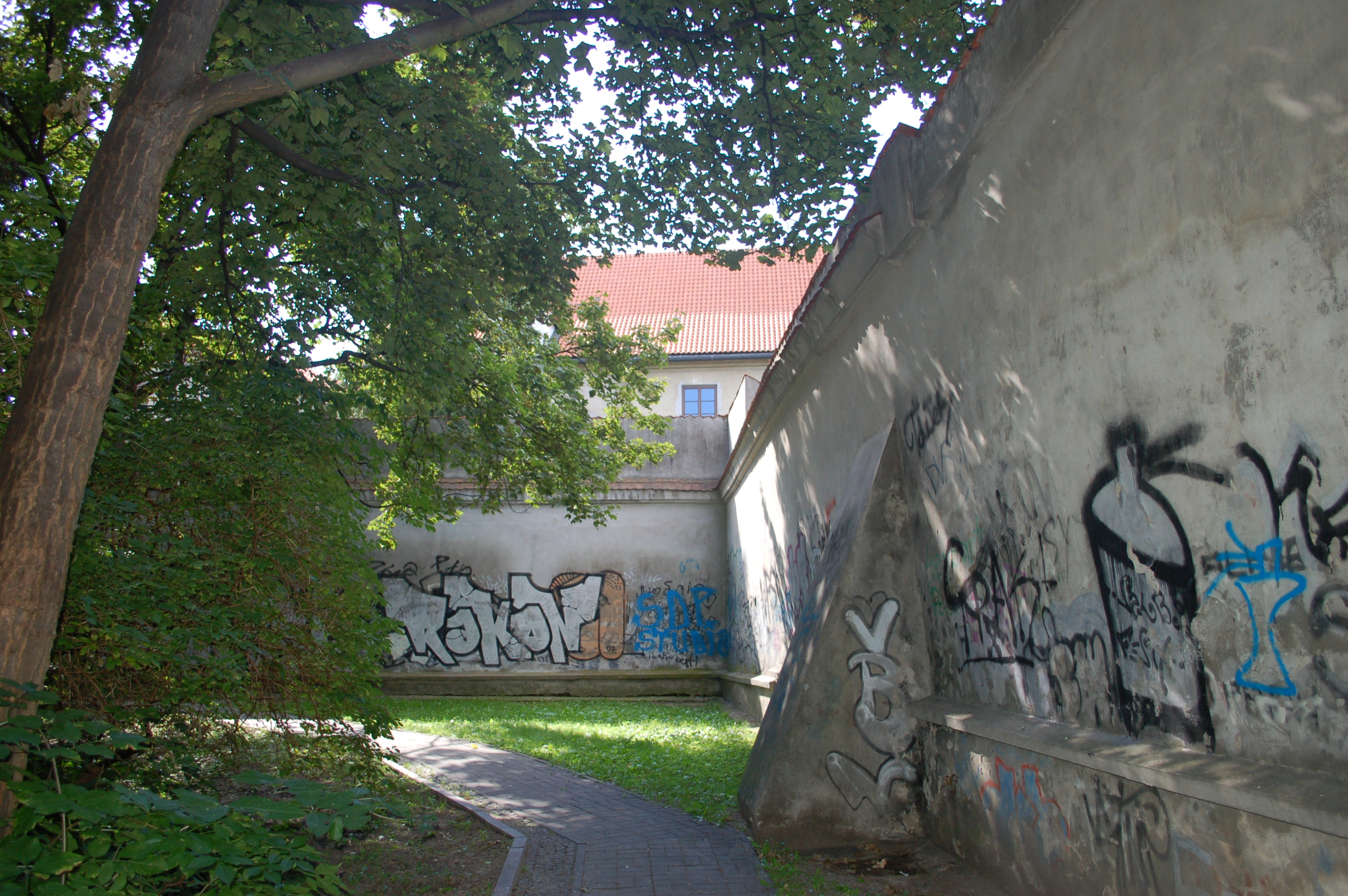 Warschau, Ostseite der Anlage, Blick von der Skarpa nach Westen (auf Parkmauer)